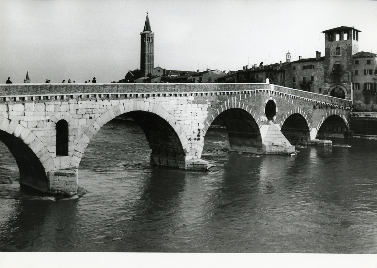 Servizio fotografico : Venezia, 1972 / Paolo Monti. - Stampe: 5 : Positivo b/n, gelatina bromuro d'argento/ carta, 24x30. - ((Al verso delle stampe manoscritti i numeri dei negativi corrispondenti (formato 35 mm) con indicazione del fotogramma: 1942-2052. - Sul coperchio della scatola iscrizione didascalica manoscritta a pennarello nero: "Città storiche (Verona)". - Occasione: Documentazione per la pubblicazione: Brugnoli Pier Paolo, "Nella bella Verona", Bologna, Cappelli, 1972. - Fonte: Quaderno di Paolo Monti: Leica 1501-3000 Controllo numerazione (1950-1978), presso Archivio Paolo Monti. - Fonte: Monografia di Brugnoli, Pier Paolo: Nella bella Verona, Bologna, Cappelli (1972). - Fonte: Fattura di Paolo Monti: IV. Commesse/ Fattura/ Fotografie per illustrazione del volume Verona (1972/12/20), presso Archivio Paolo Monti. N. 292 riprese fotografiche della città di Verona in formato 24x30